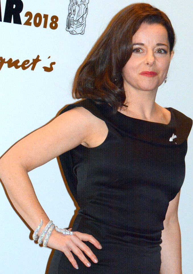 Laure Calamy à la cérémonie des César du cinéma